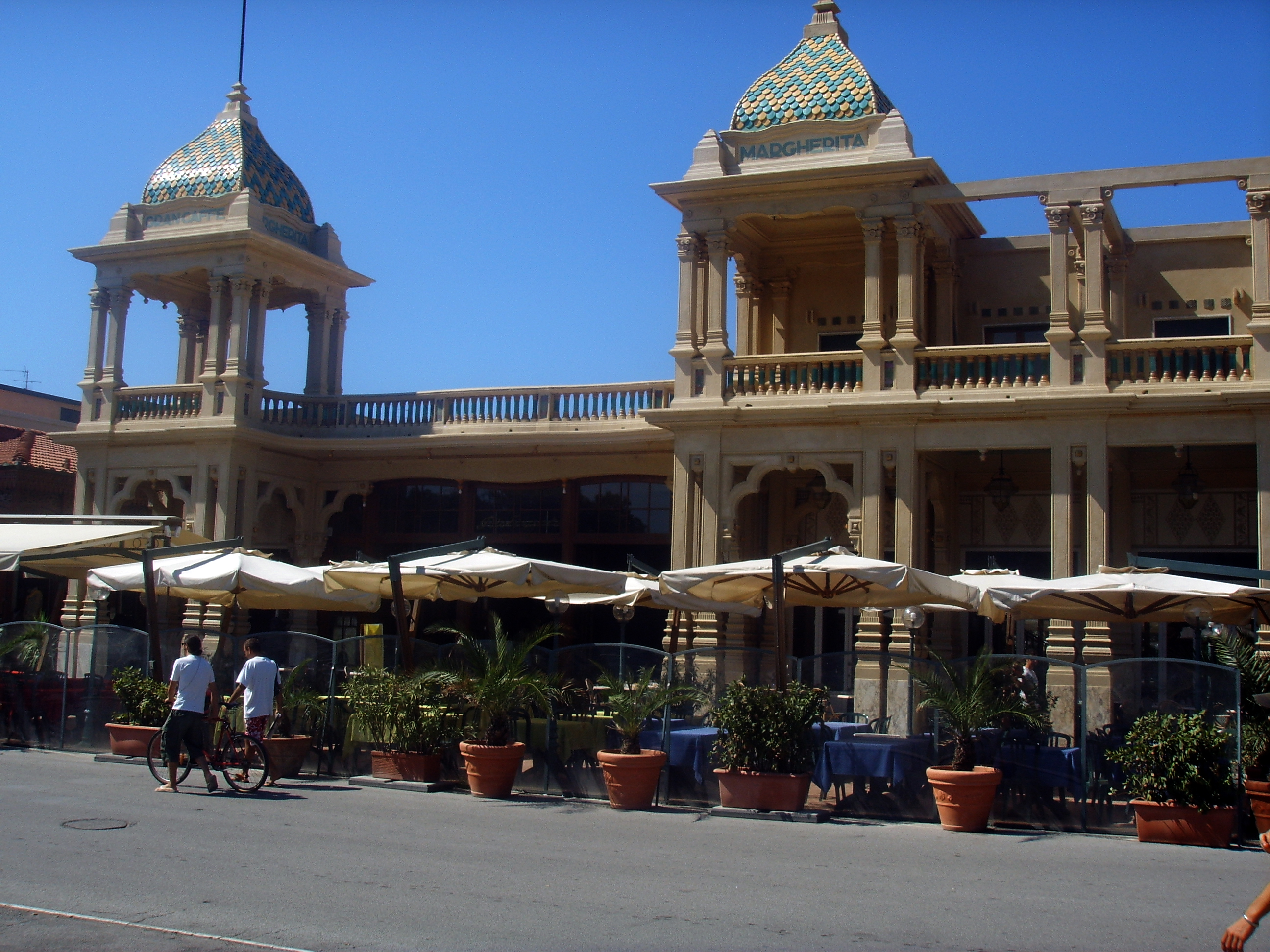 Viareggio, caffè_margherita in Viareggio, italy